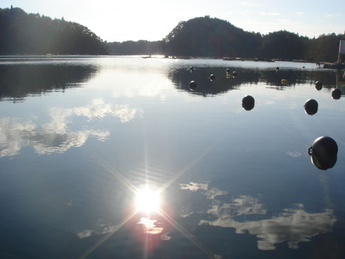 波静かに光る舞根湾（気仙沼市唐桑町）